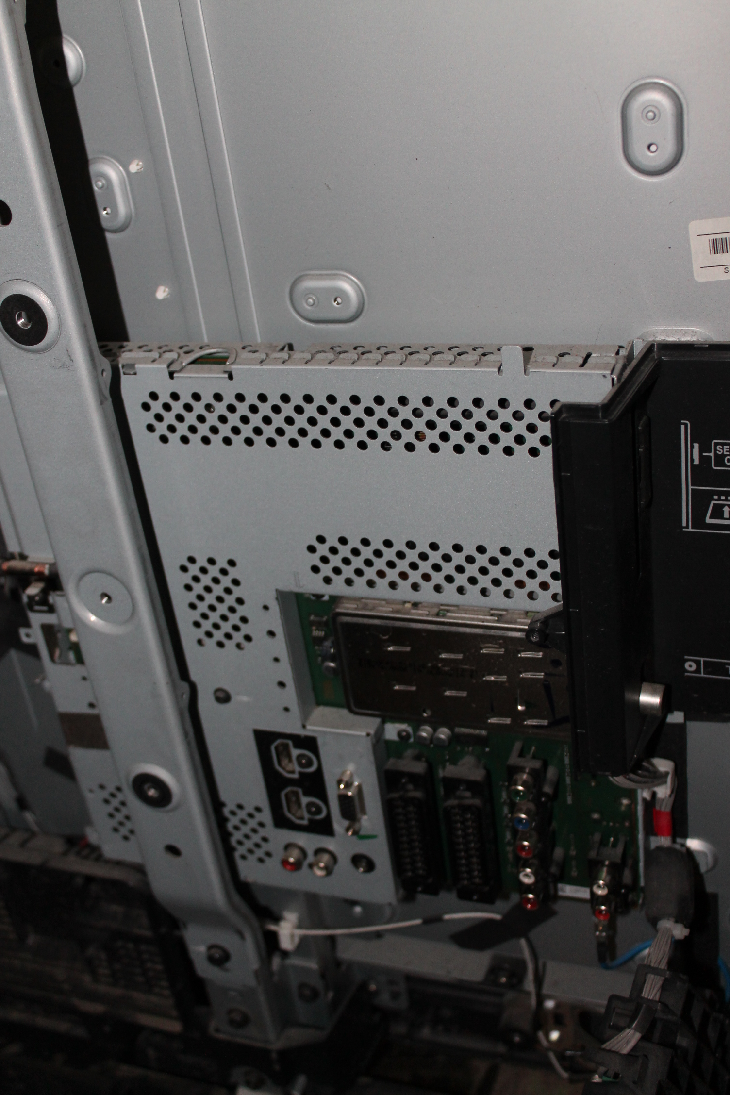 Taulutelevision sisääntuloliitännät Faradayn häkin päällä.